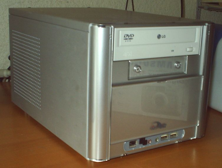 Mein Barebone-PC.